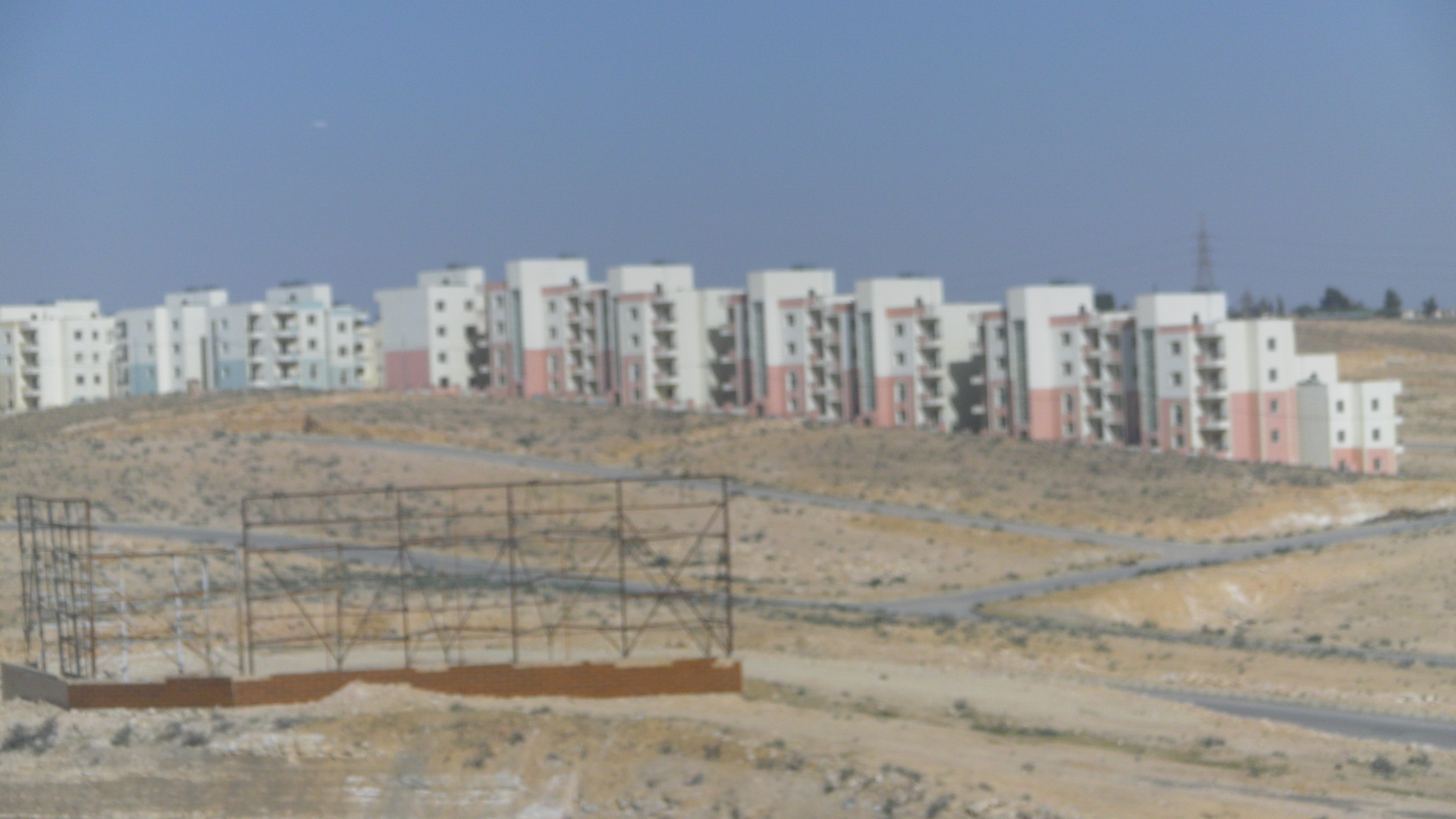 اسكان مقابل جبل طارق، الزرقاء